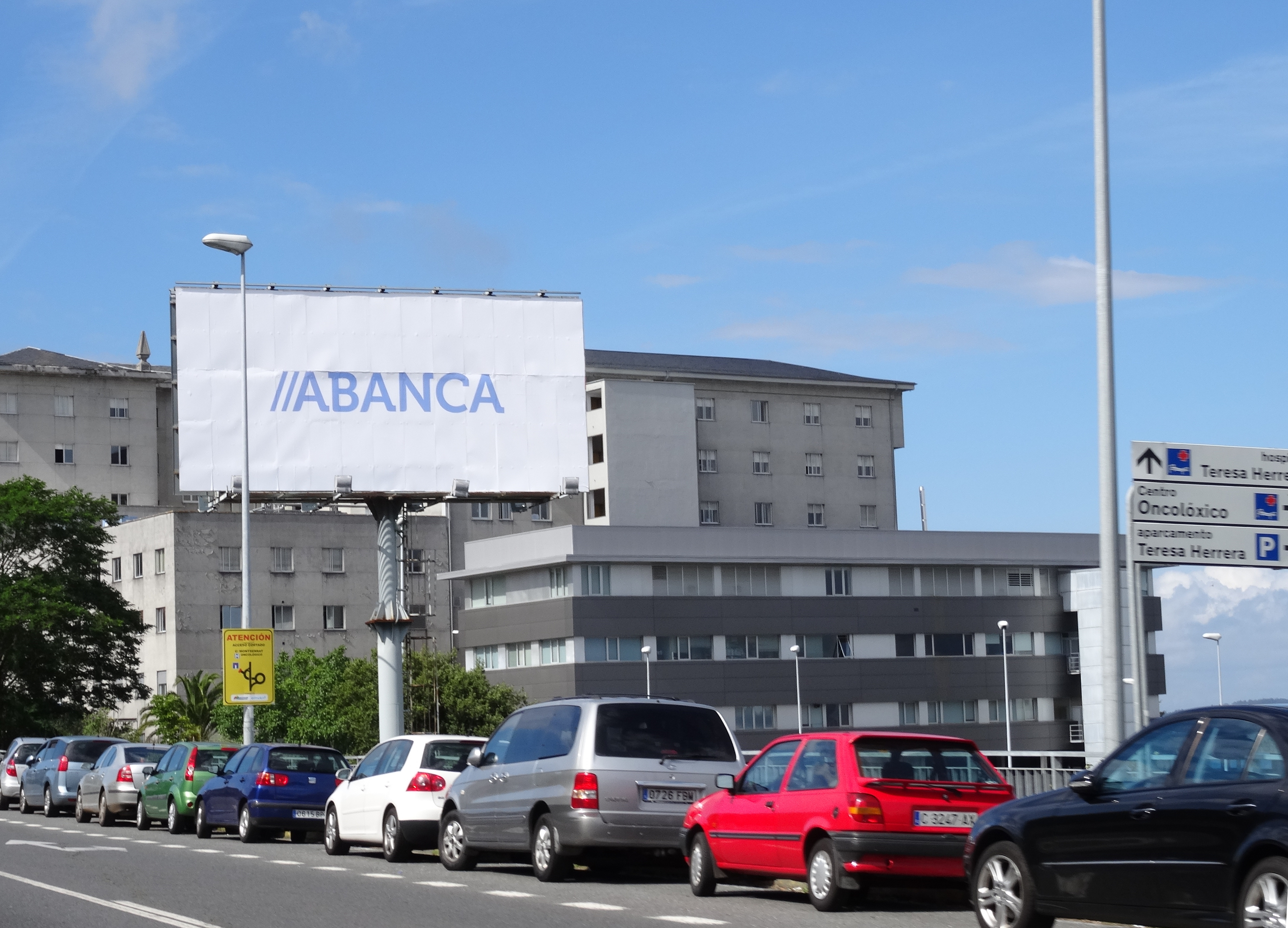 Cartel de ABANCA na Coruña.